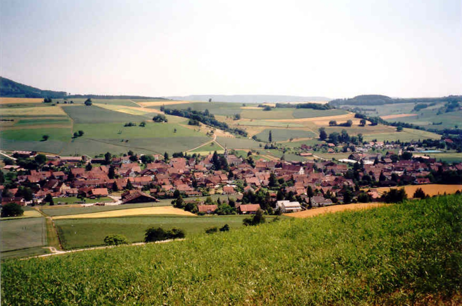 Aussicht auf das Dorf Schleitheim (Schlaate)